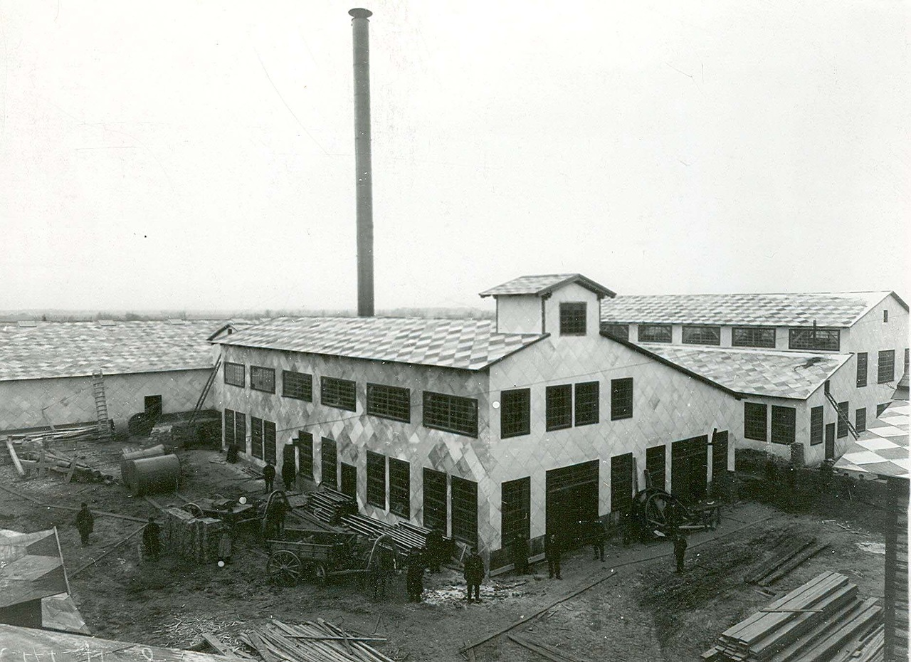 «Уралит» Завод противопожарных строительных материалов (Большая Охта, Матросская слобода), 1900 год